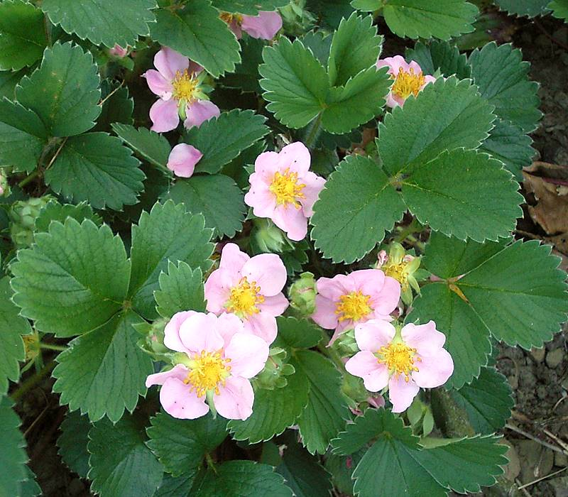 Fragaria × ananassa (Fragaria virginiana x Fragaria chiloensis) x Comarum palustre Pink Panda